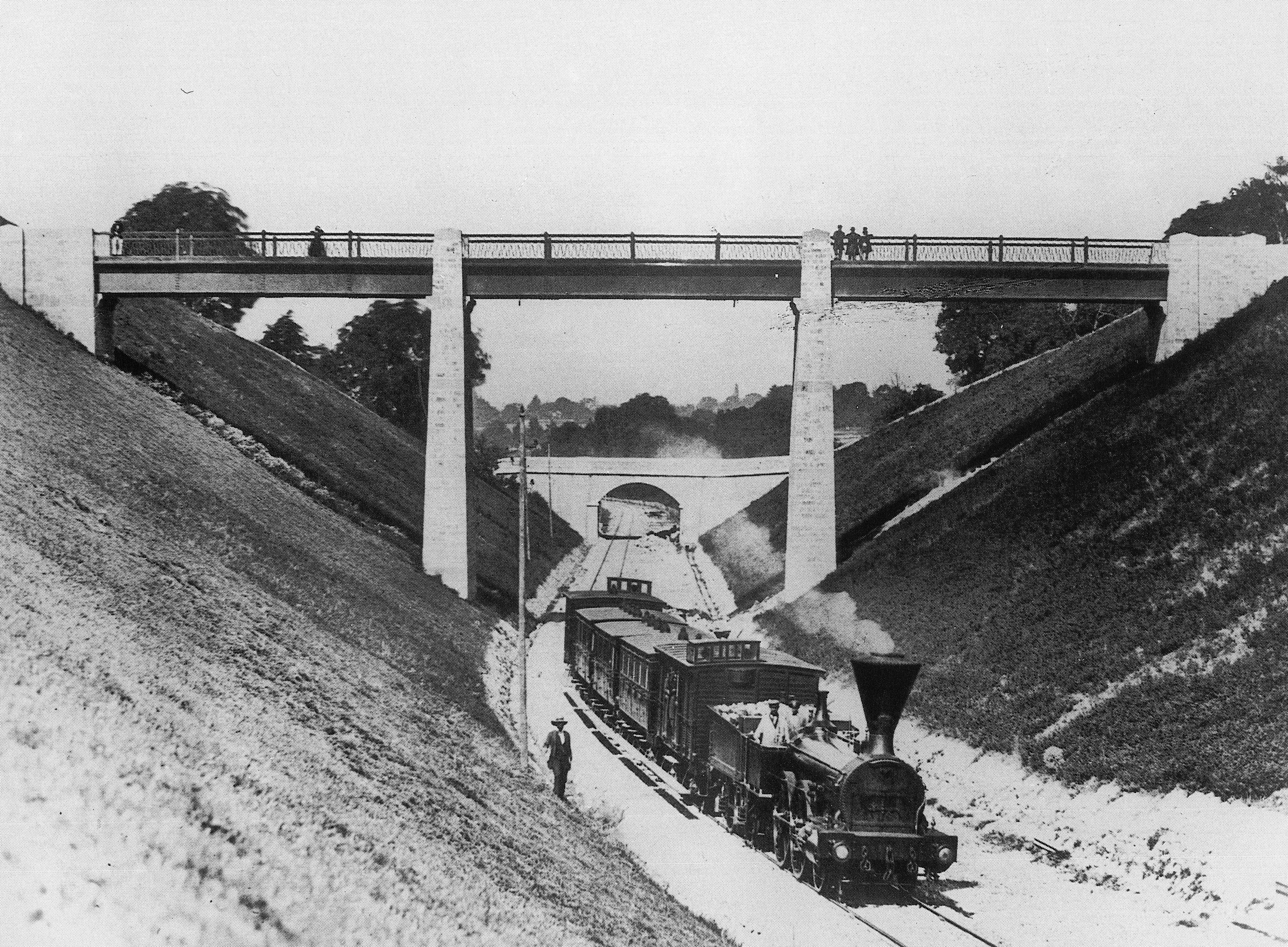 Zug der Compagnie de l’Oueſt des chemins de fer ſuisſes zwiſchen Lauſanne und Renens, aufgnommen kurz nach Eröffnung der Strecke 1856.